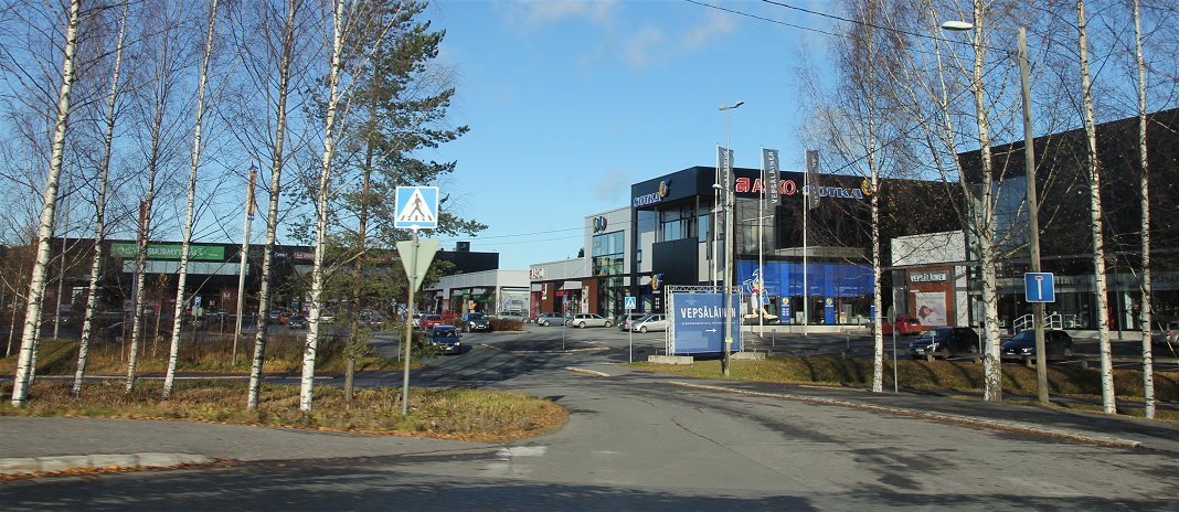 Kauppakeskus Cantti, Kartanonkatu 4: n risteys Kuopion Leväsen kaupunginosassa.